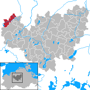 Jürgenshagen in Mecklenburg-Vorpommern - District Güstrow